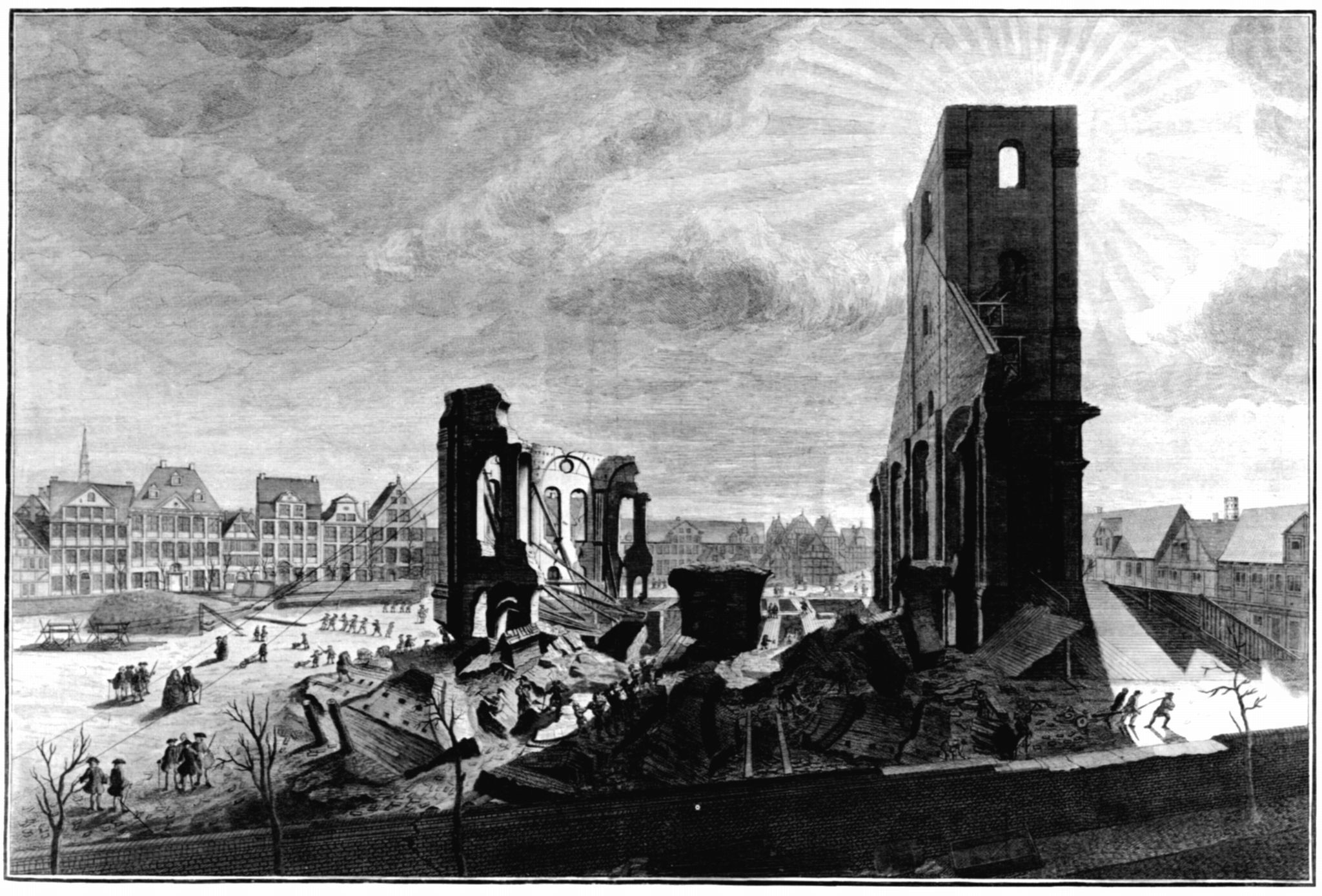 Jonas Haas: Michaeliskirche in Hamburg nach dem Brand 1750